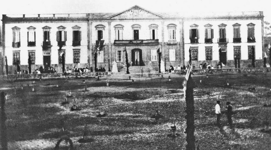 Palacio de Capitanía General 1885 En primer plano, podemos ver los futuros terrenos para la plaza Weyler, que fue inagurada en 1893